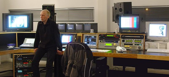 Video editor in digital linear suite. 2002.